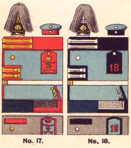 Uniformen Dragonerregiment Nr. 17 u. 18